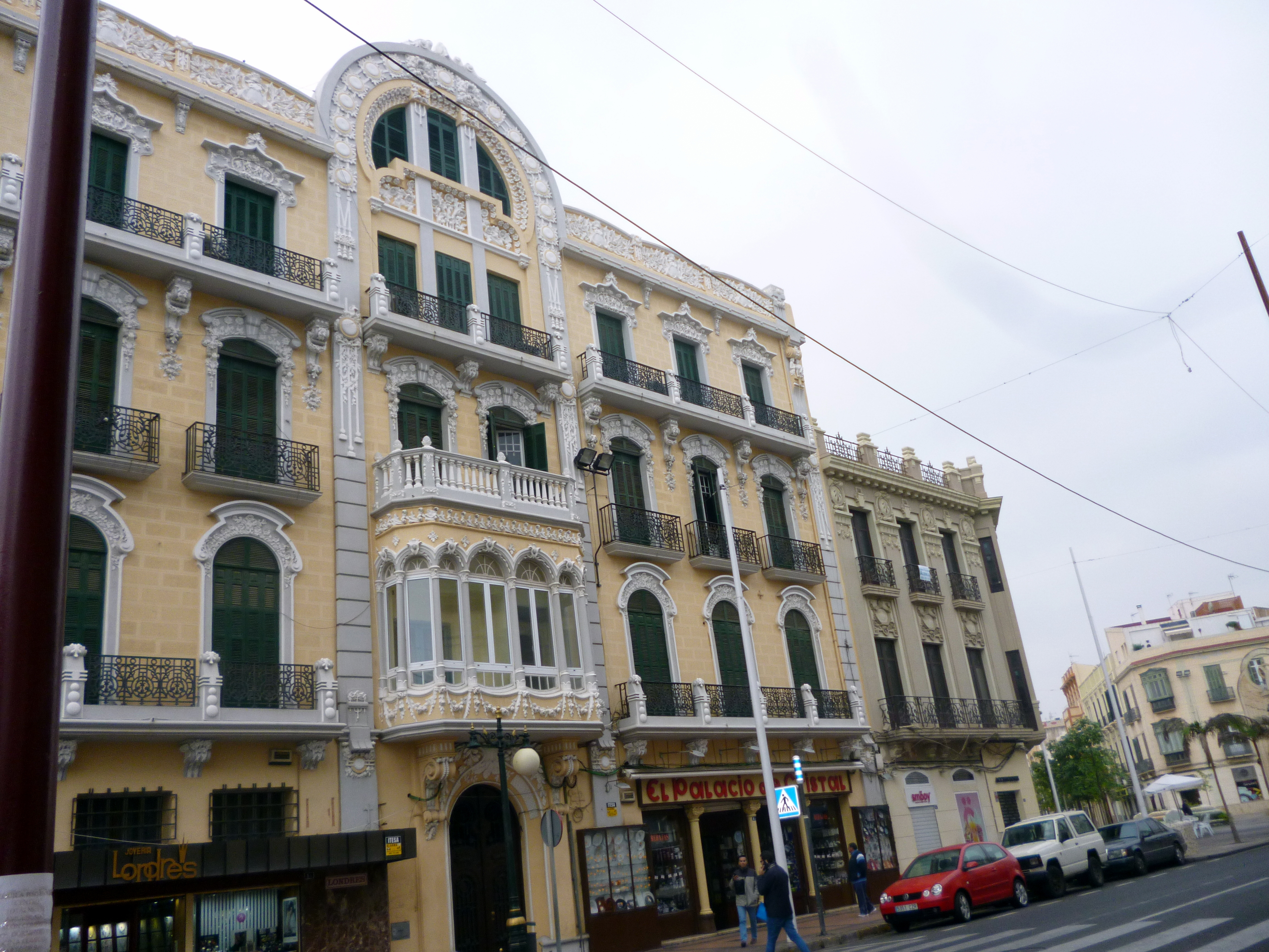 Melul